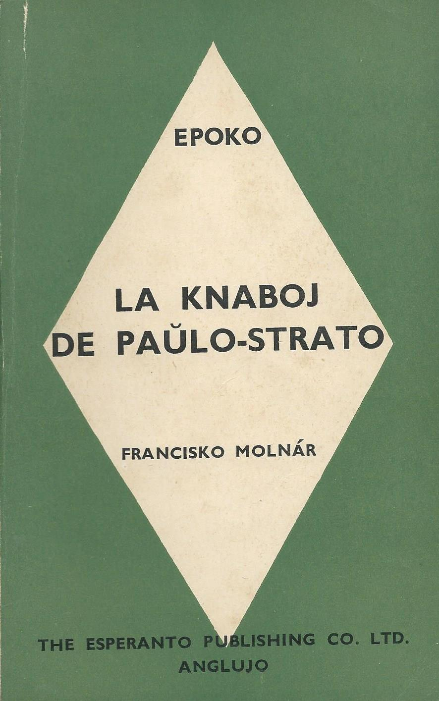 librokovrilo de "La Knaboj de Paŭlo-strato", 1937